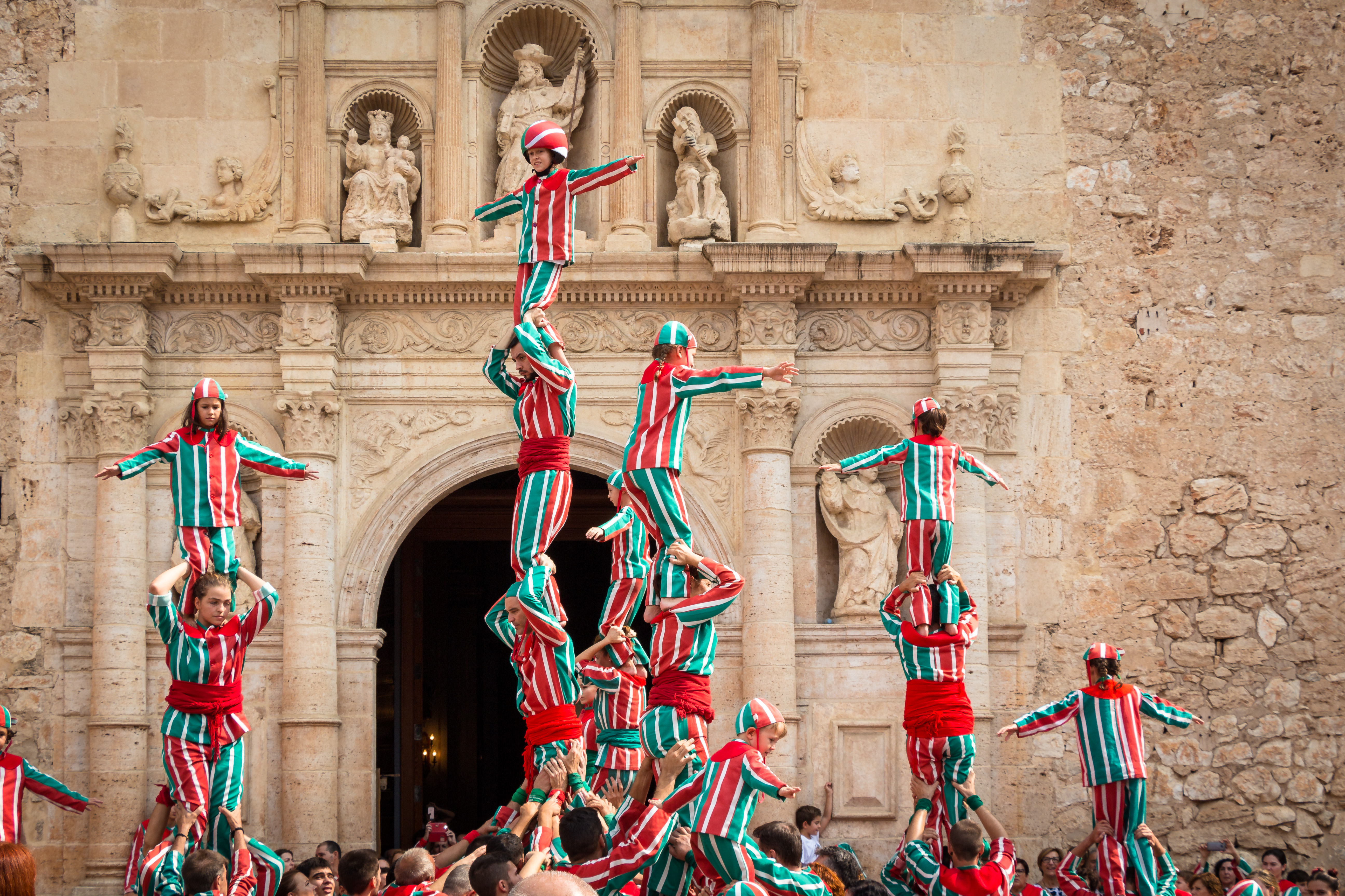 Además de construir las torres humanas, la Muixeranga (en este caso, miembros de la Nova Muixeranga) también se mueve realizando una danza. This is a photography of a Folklore festival in Spain (Wikidata id Q3290365).